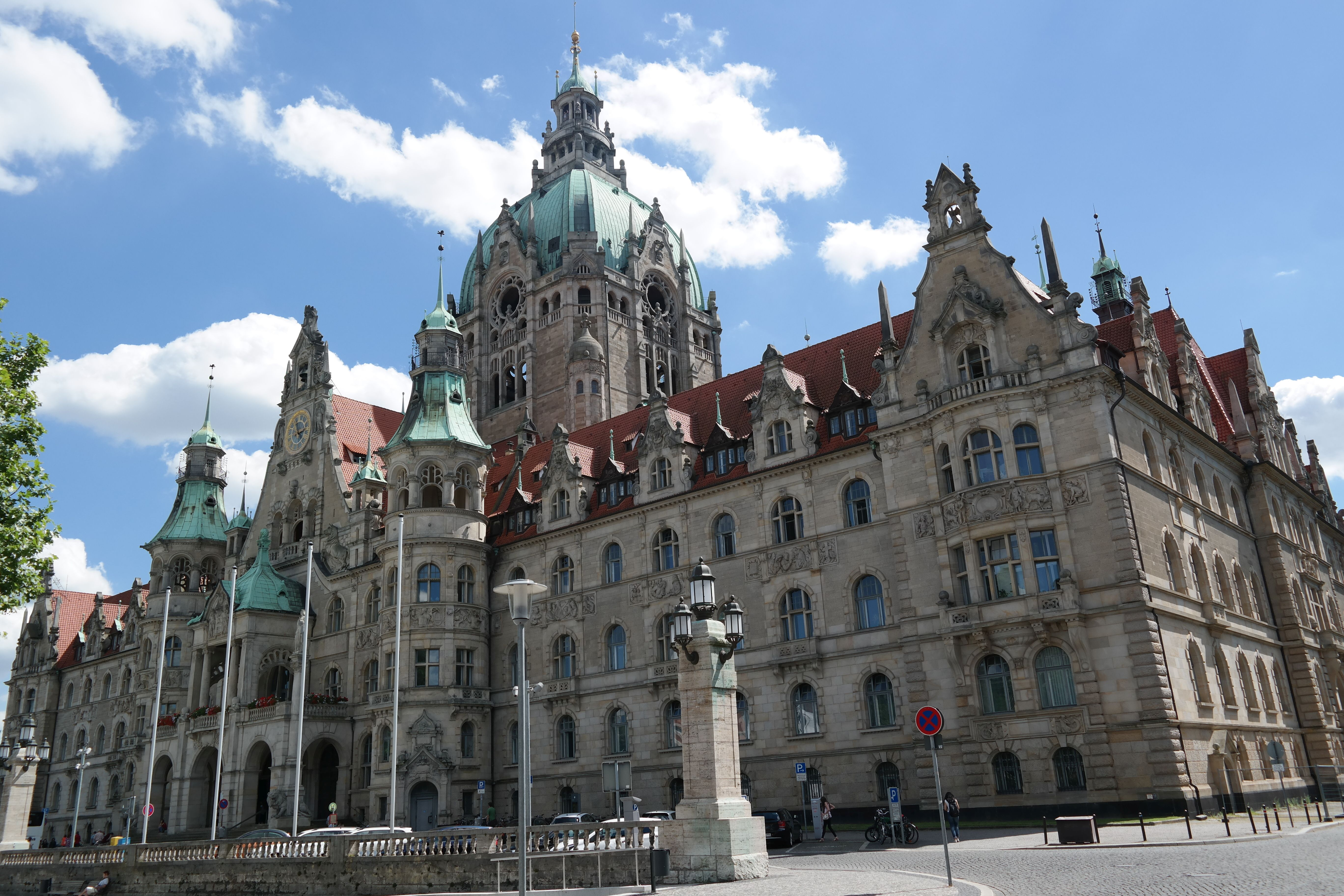 Urbodomo de Hanovro